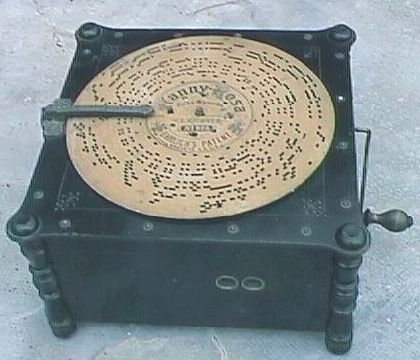 Instrumento musical Ariston